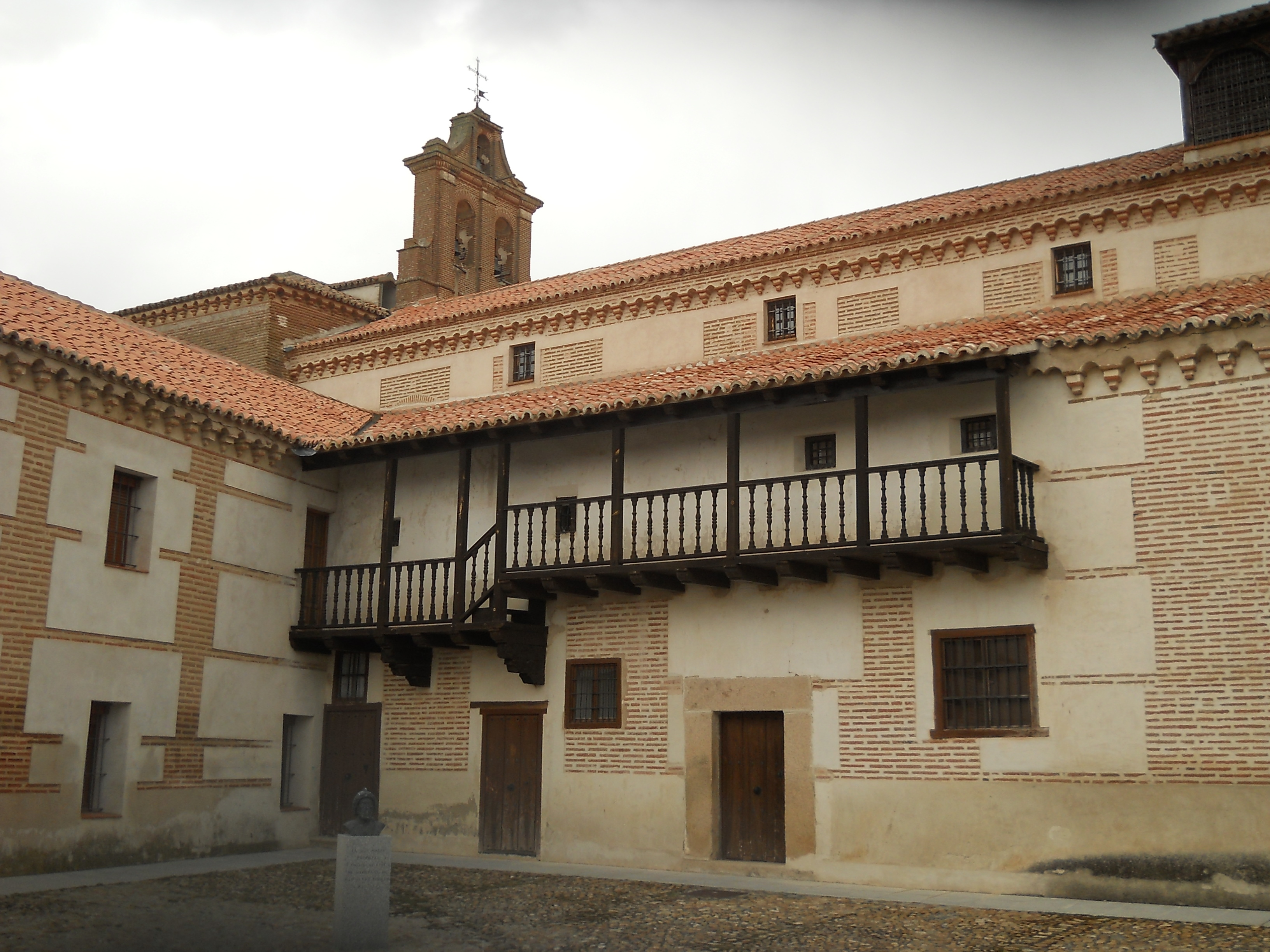 Casa natal de Isabel la Católica, Madrigal de las Altas Torres, Ávila, España